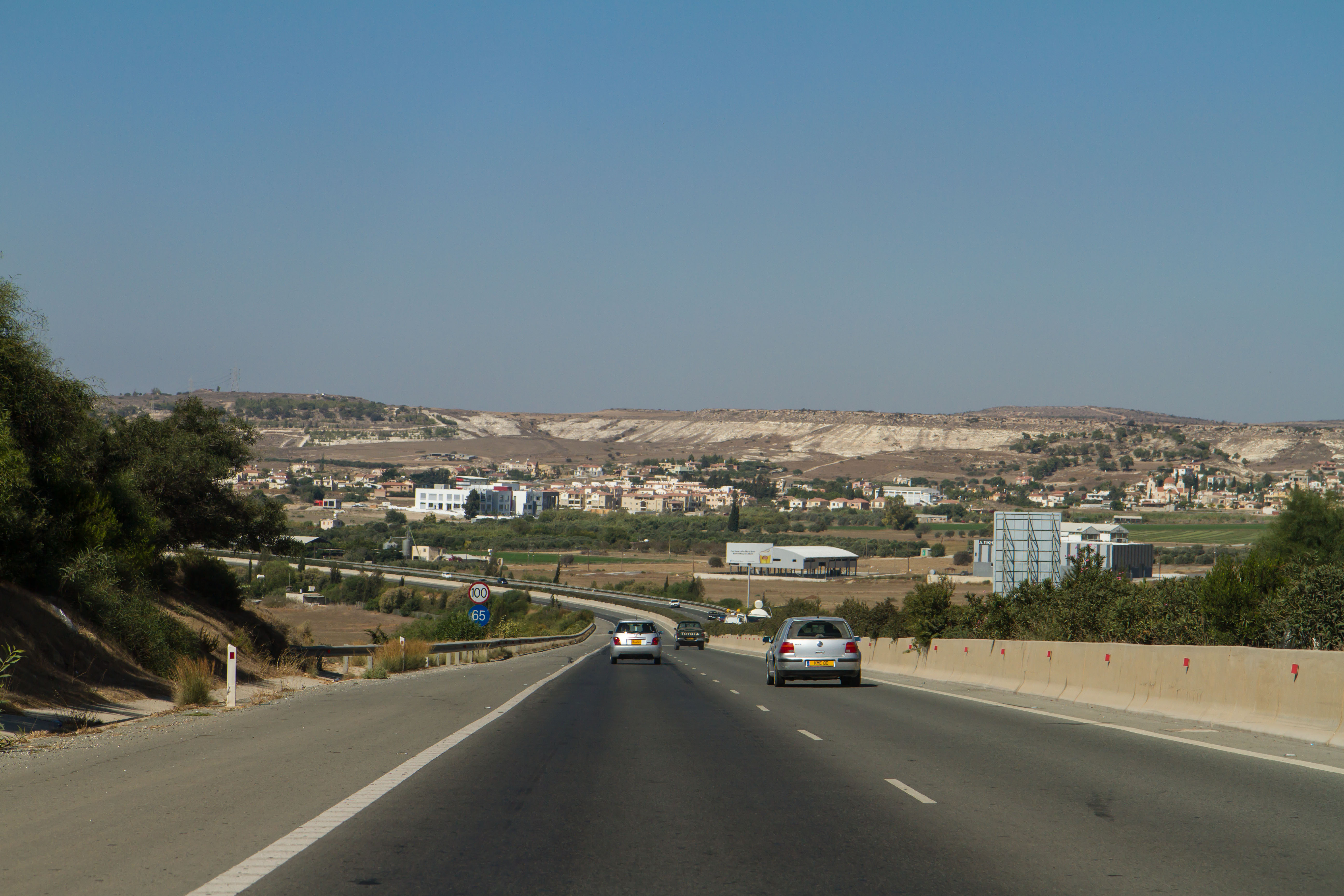 A3 near Xylotymvou, Cyprus